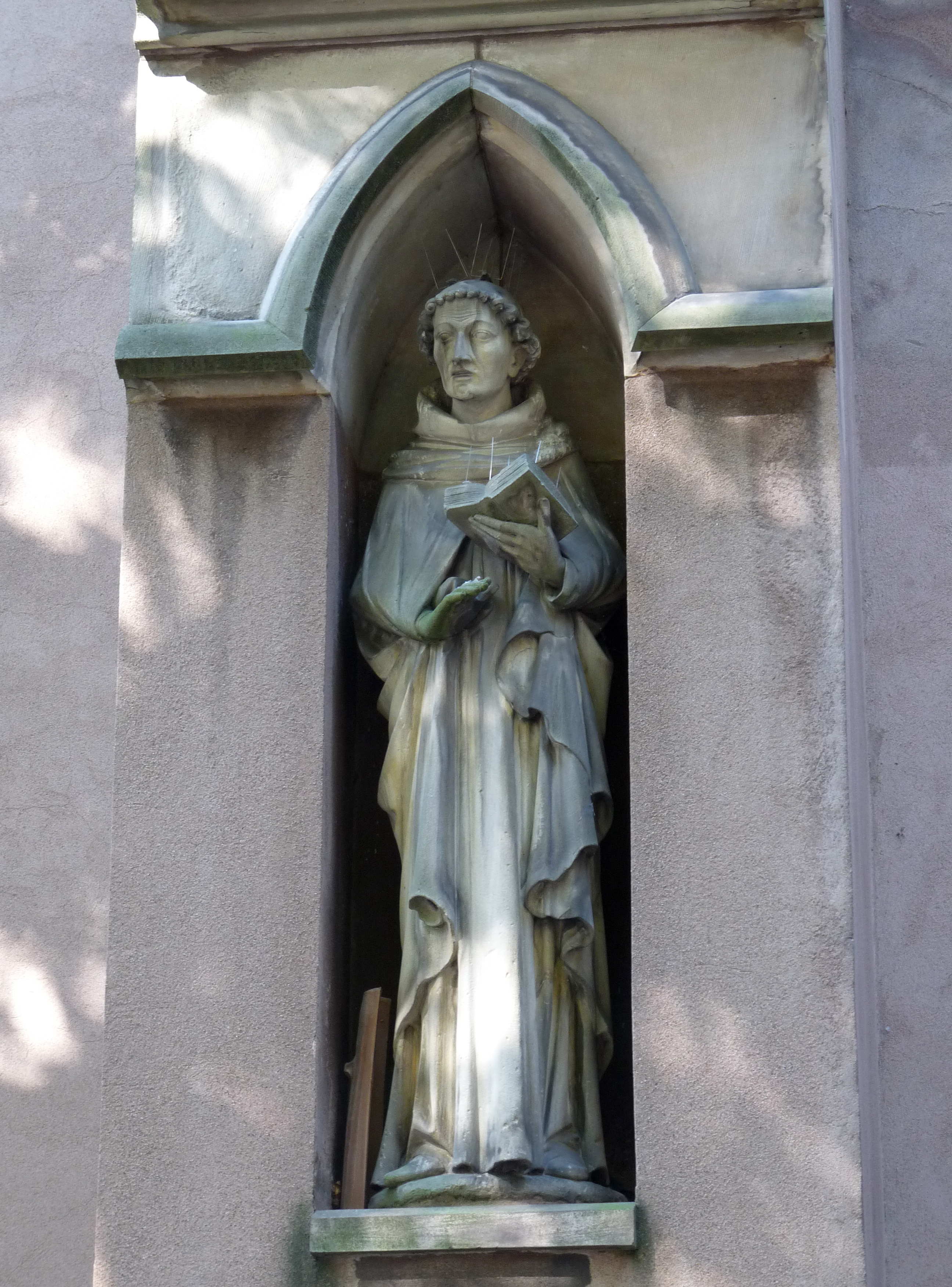 Statue de Jean Tauler dans une niche de la façade sud de l'église Saint-Pierre-le-Jeune protestant (Strasbourg). À la place des statues détruites pendant la Révolution, dans une niche vide, en 1898, le sculpteur en chef de l'Oeuvre Notre-Dame, Ferdinand Riedel (1863-1912), durant la période allemande de l'Alsace, a placé cette statue directement inspirée de la pierre tombale de Jean Tauler conservée dans l'actuelle Temple Neuf, lieu de culte bâti sur les ruines de l'ex couvent des Dominicains, reconverti en bibliothèque municipale à la Révolution Française, bombardé et détruit par le feu avec ses précieux manuscrits le 26 août 1870. la pierre tombale de Jean Tauler est l'un des rares vestiges avec quelques vitraux ayant traversé ce désastre. )